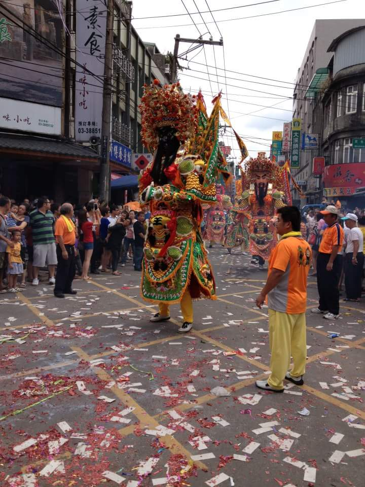 民國101年8月11日大溪大拜拜。